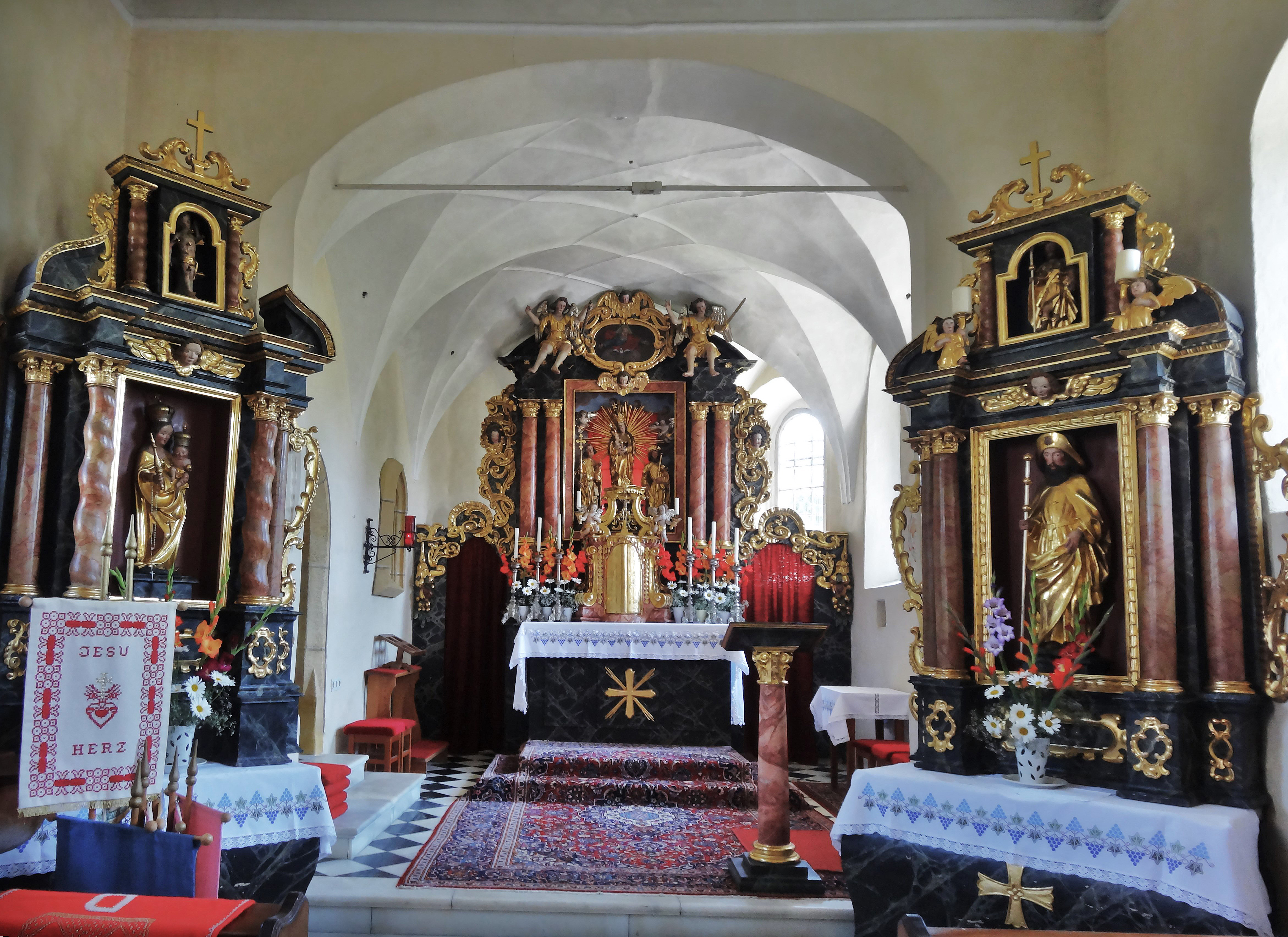 Kath. Filialkirche hll. Philipp und Jakob, Sittich. Innenansicht